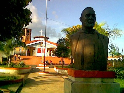 Praça Antonio Vale com a Igreja de Santo Antonio de Pádua ao fundo. Frei Raimundo de Cenate( depois do Vale), um mais representativos frades pioneiros que geriram a Paróquia Pioneiro da antiga sede da Paróquia de Santo Antonio. Grande incentivador das famosas quermesses de Santo Antonio, onde além da arrecadação de fundos para os serviços de assistência social da Igreja, a comunidade tinha a oportunidade para se encontrar e se divertir. Quando de sua gestão a Paróquia contava com um centro de produção de alimentos (Fazenda Galiana), uma fábrica de tijolos industriais para a venda à população carente, um cinema (ultra-moderno à época), além da sede e a Igreja. Por problemas com as cheias anuais do Rio Mearim o complexo da Paróquia teve de ser mudado para o local atual (sobre uma elevação próxima).